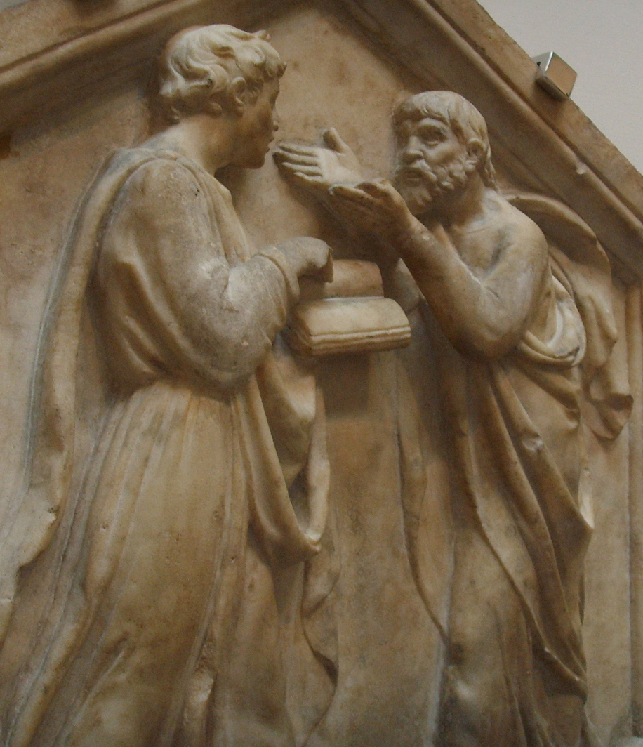 Formella 21, platone e aristotele o la filosofia, luca della robbia, 1437-1439dettaglio